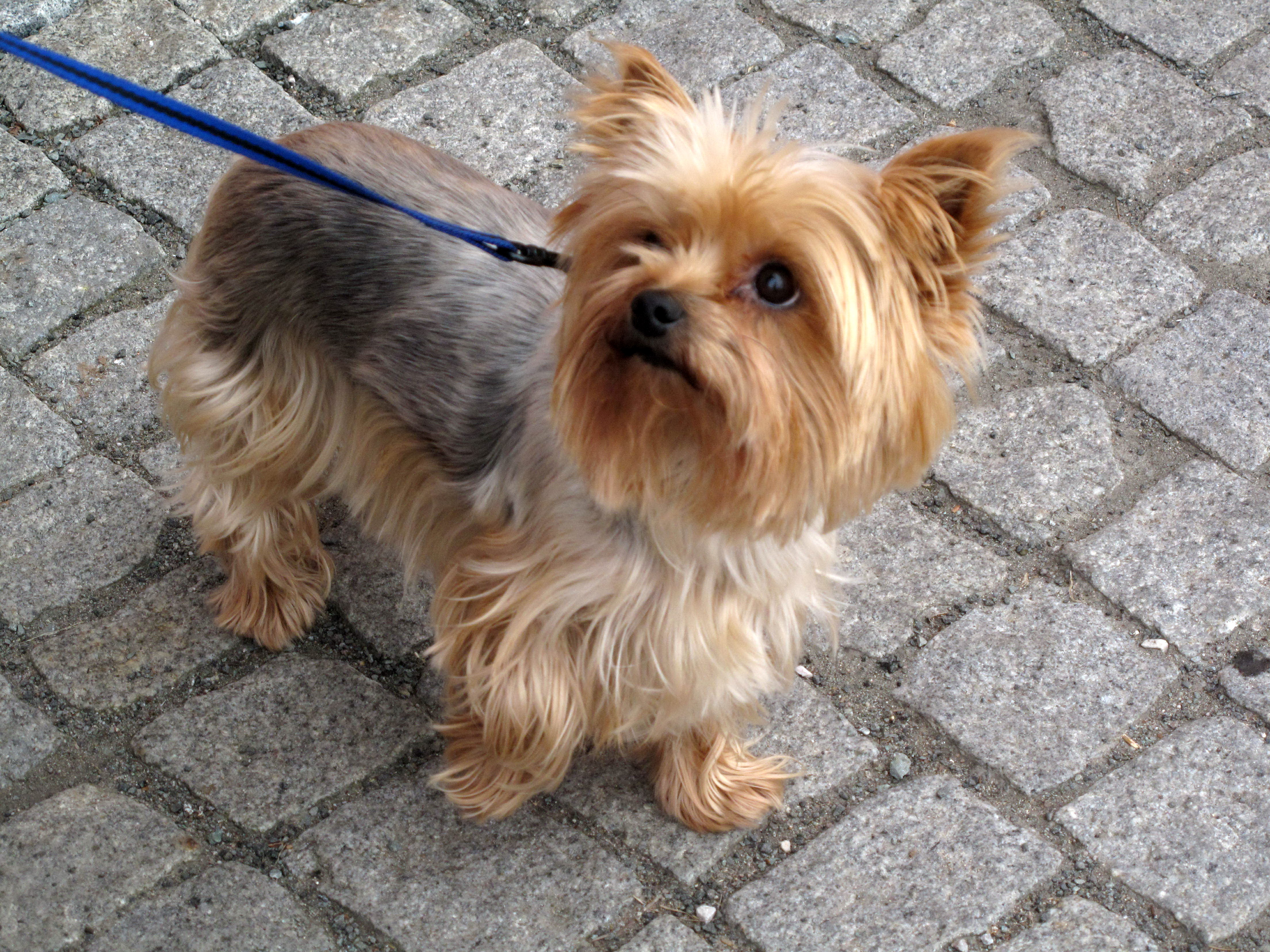 Yorkšírský teriér, fena mladšího věku